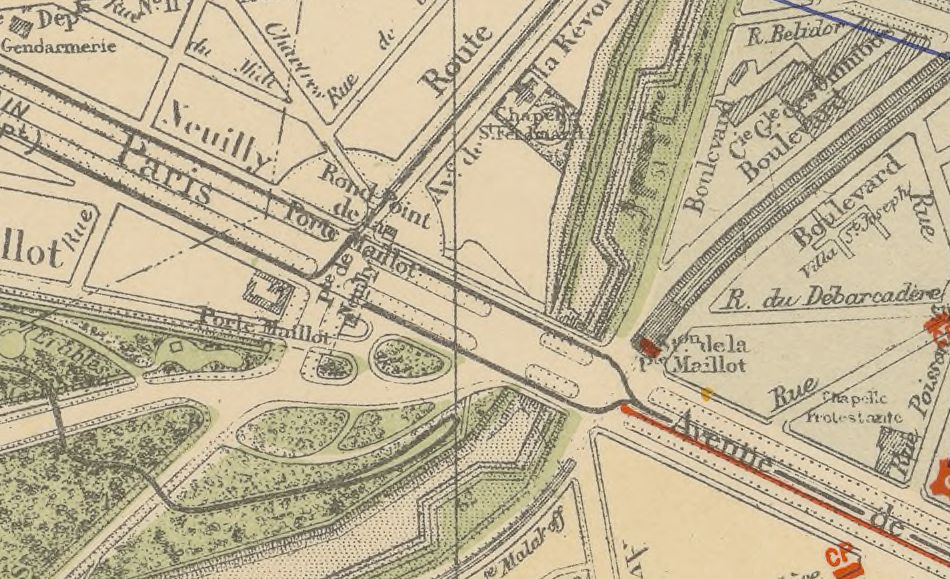 Extrait de la Porte Maillot en provenance du Plan cadastral de la ville de Paris... / établi d'après les documents officiels les plus récentes et comprenant l'Exposition universelle de 1900, par Mme Max Mabyre